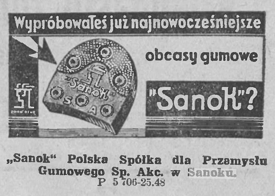 Reklama fabryki "Sanok Polska Spółka dla Przemysłu Gumowego" w gazecie "Orędownik".